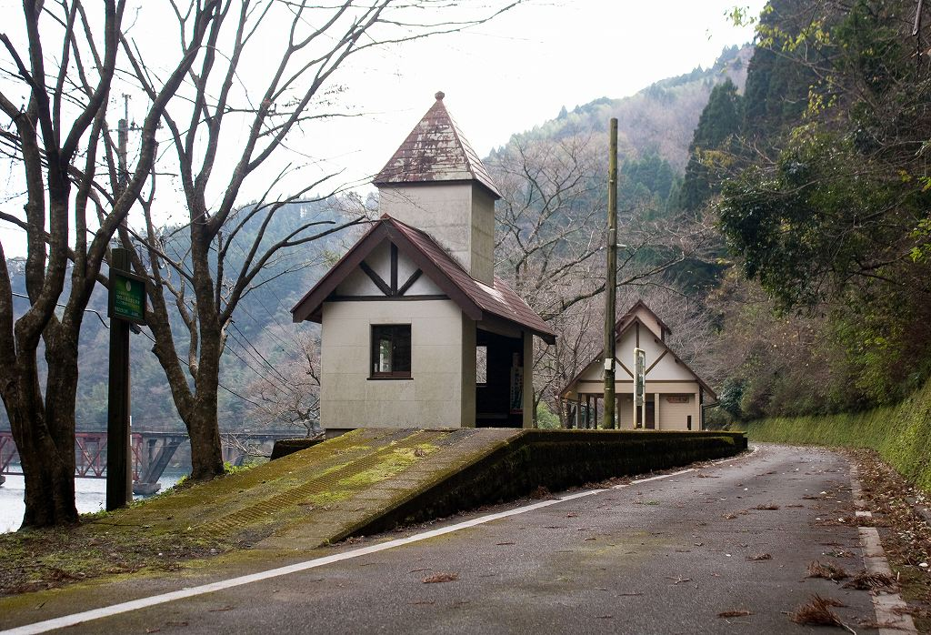 高千穂鉄道吾味駅